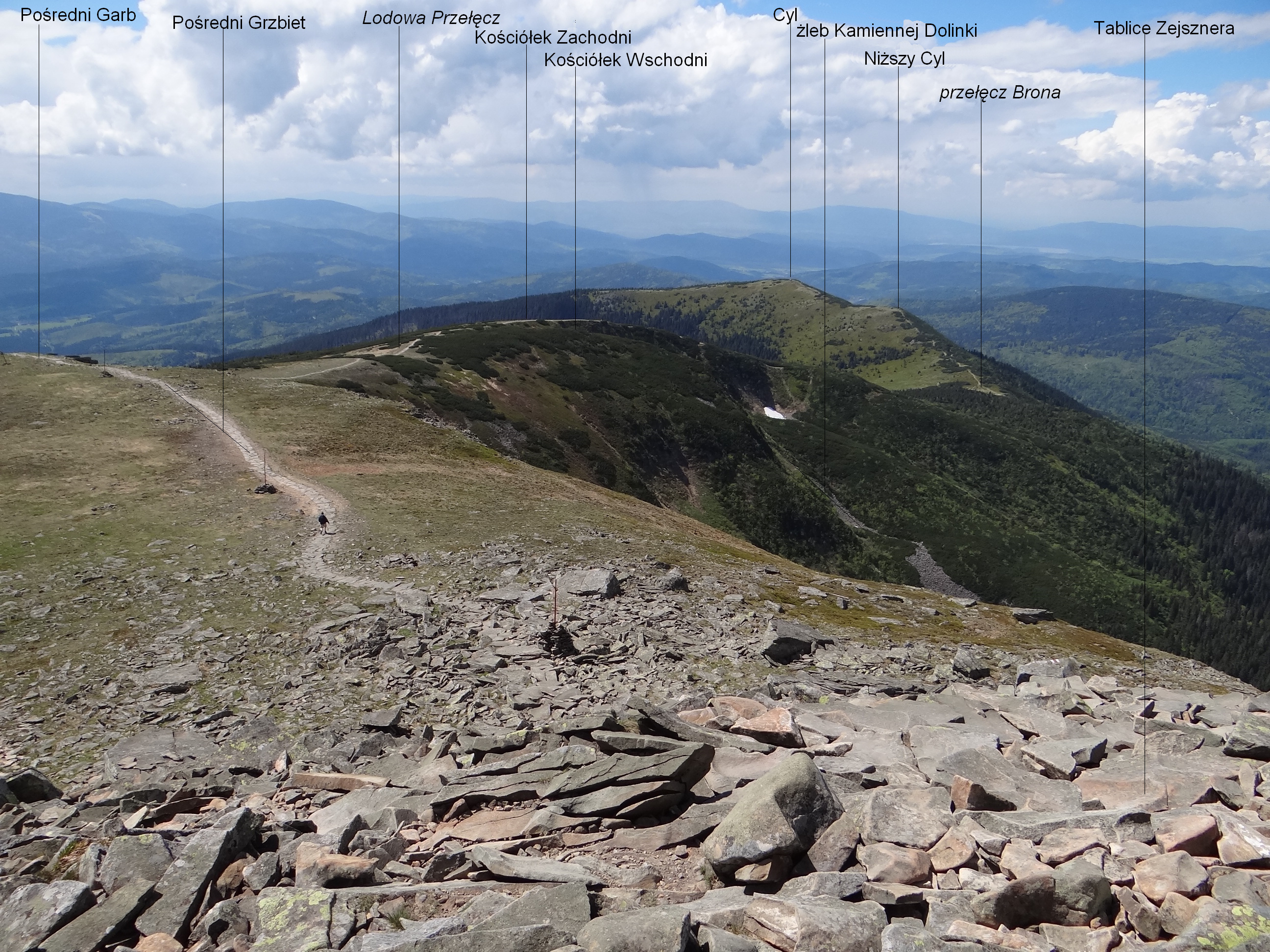 Widok z Diablaka na zachód